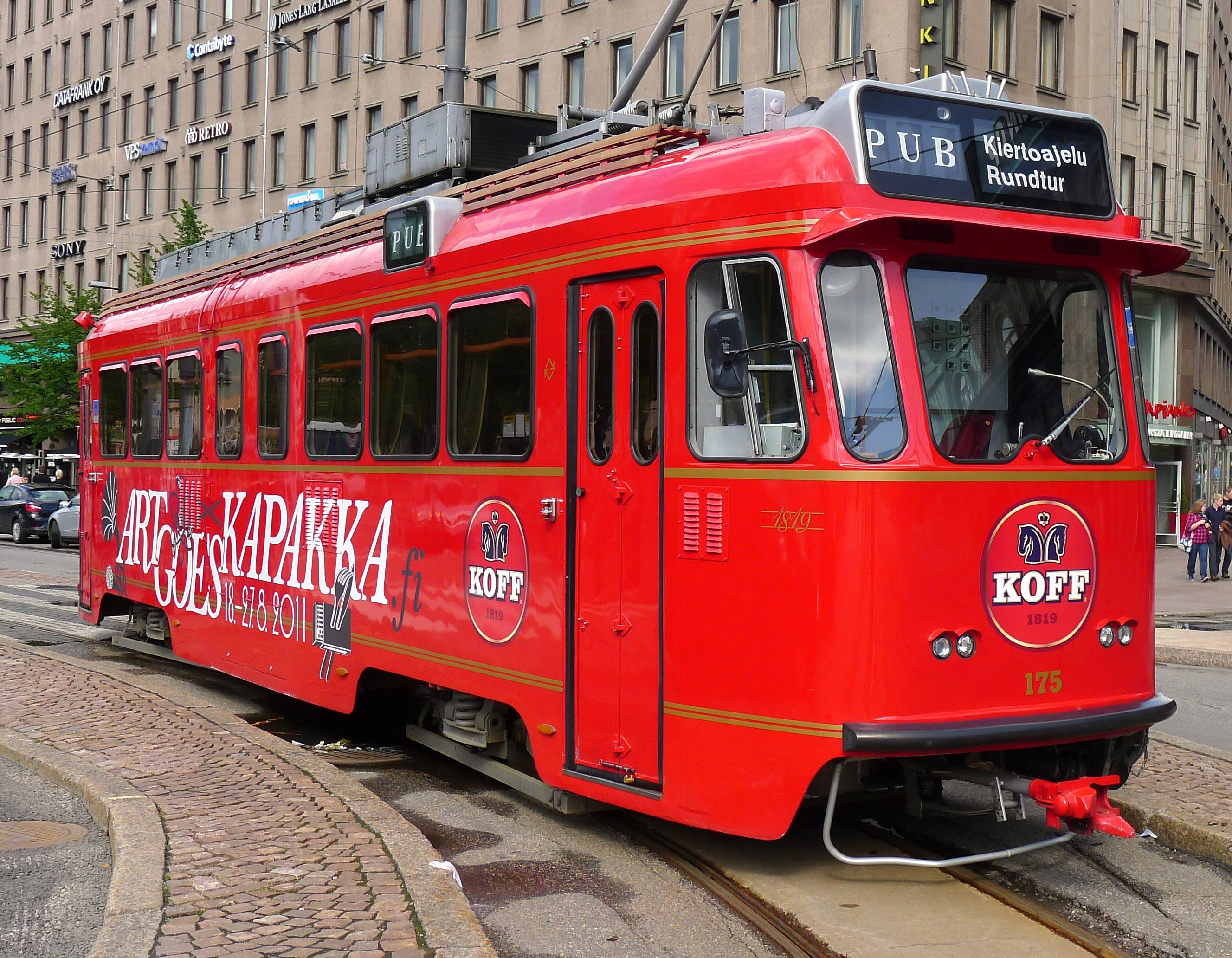 Spårakoff, Straßenbahn vom Typ „Karia HM V“, wurde in ein Pub umgebaut